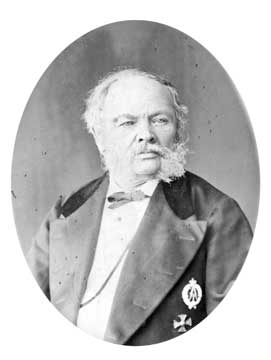 Лаўрэнцій Аляксеевіч Загоскін